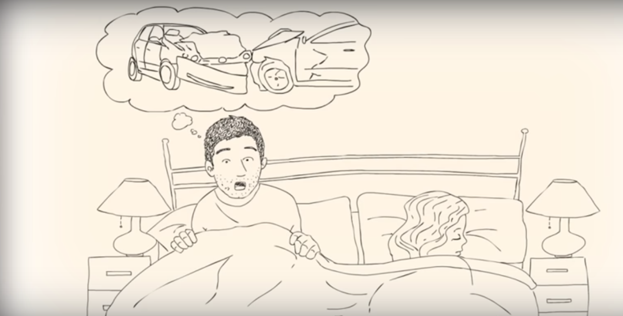 Патологическое репереживание (флешбэк) при ПТСР